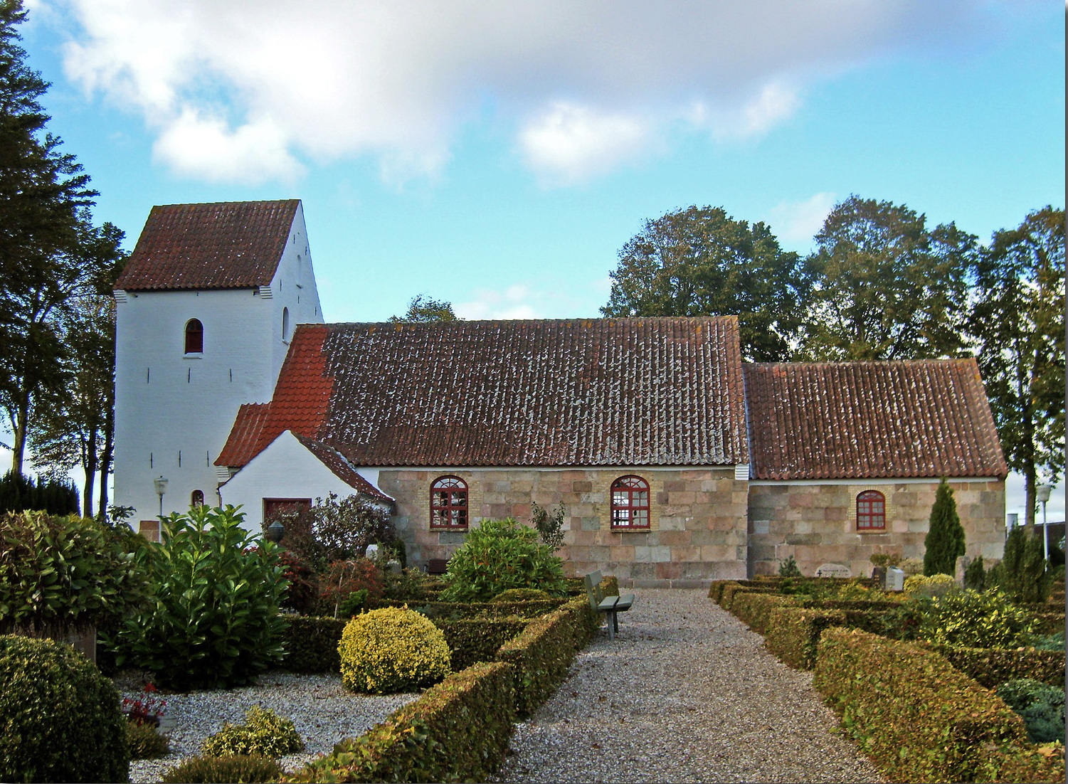 fra sydøst